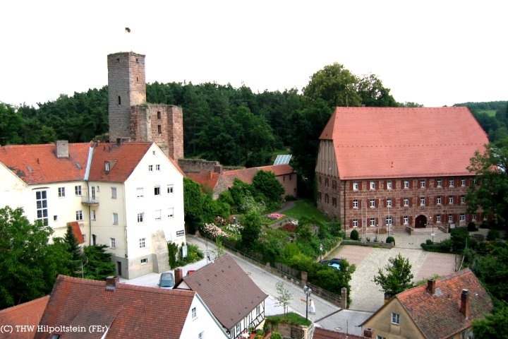 Blick vom Kirchturm der Katholischen Kirche St. Johannes auf die Hilpoltsteiner Burg, das Haus des Gastes (ehem. Getreidespeicher) und das ehem. Krankenhaus.